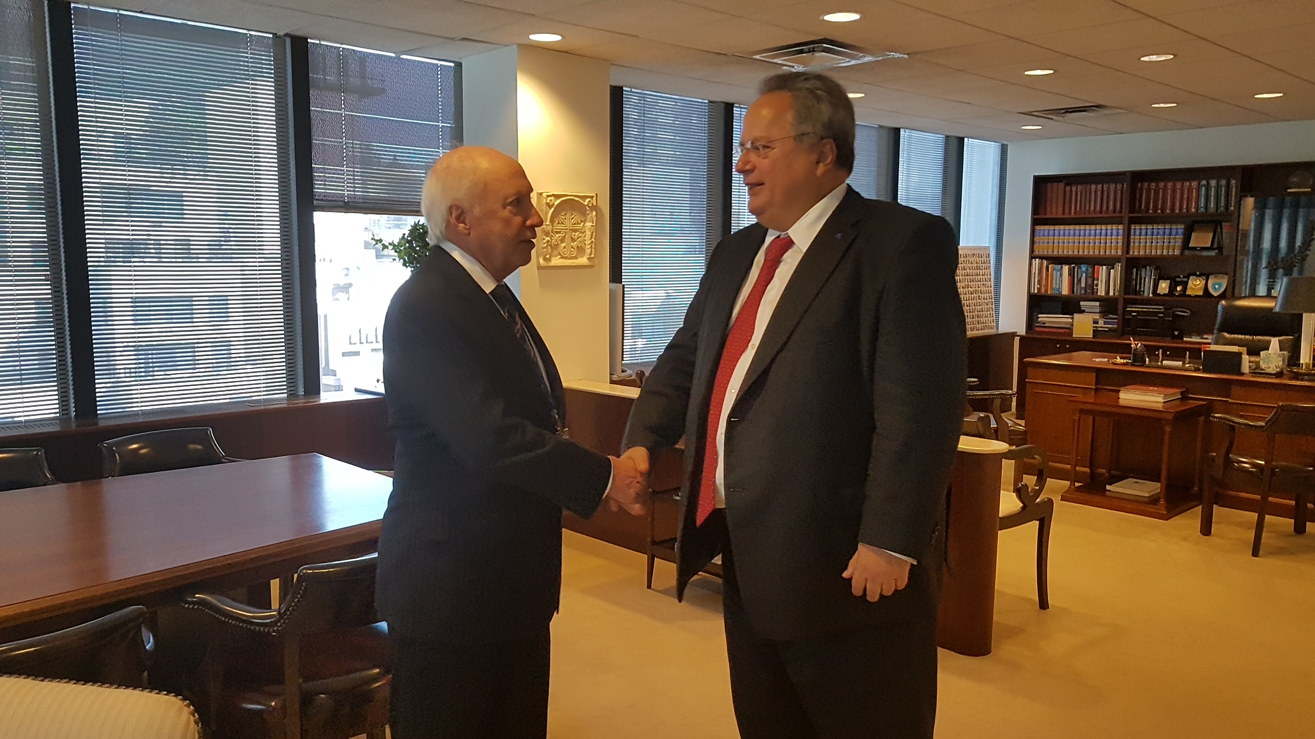 Στο πλαίσιο της Εβδομάδας Υψηλού Επιπέδου της 71ης Συνόδου της ΓΣ του ΟΗΕ στη Νέα Υόρκη, ο ΥΠΕΞ, κ. Νίκος Κοτζιάς, συναντήθηκε, την 23/9/2016 με τον προσωπικό απεσταλμένο του Γενικού Γραμματέα του ΟΗΕ, κ. Matthew Nimetz.